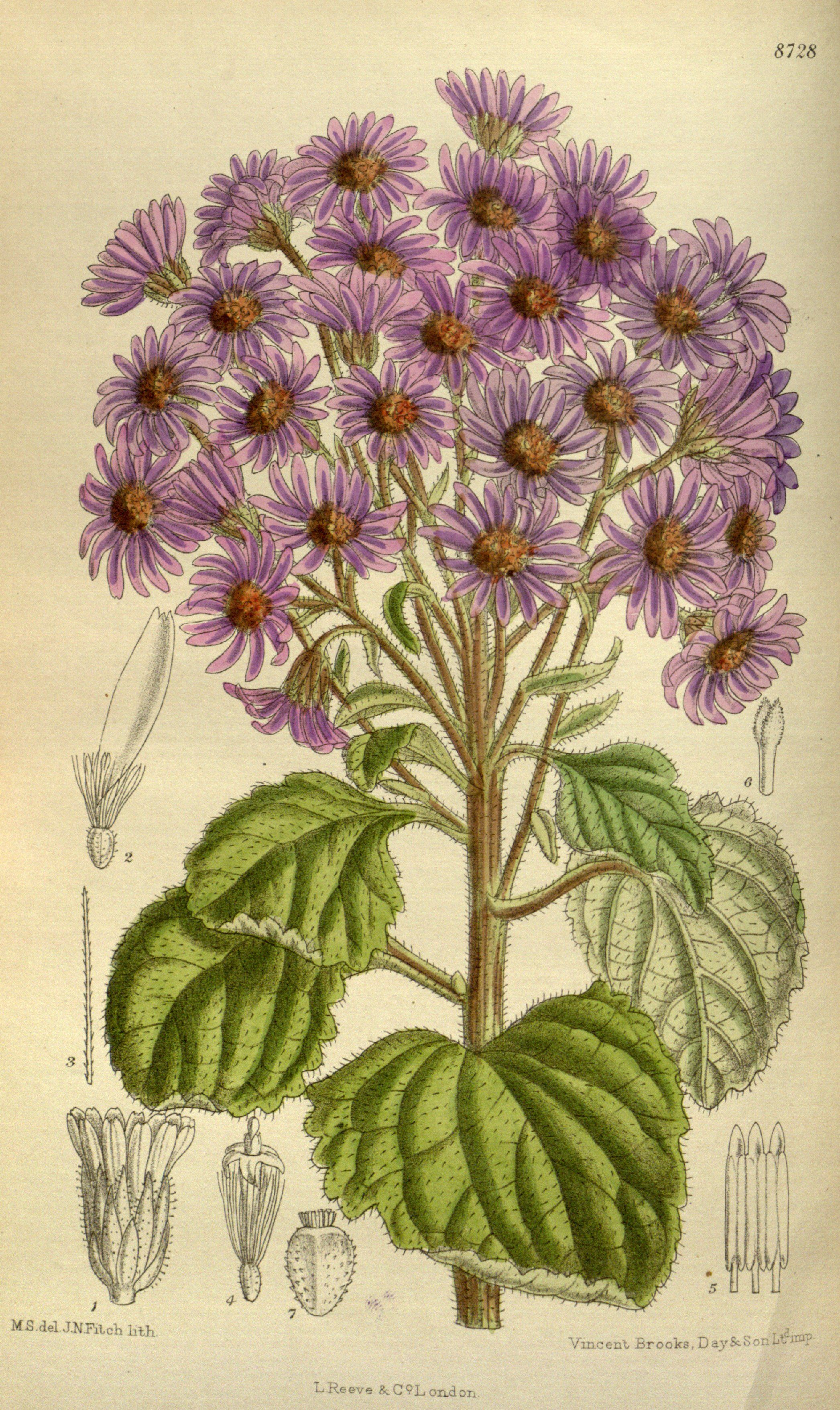 Aster fuscescens, Asteraceae